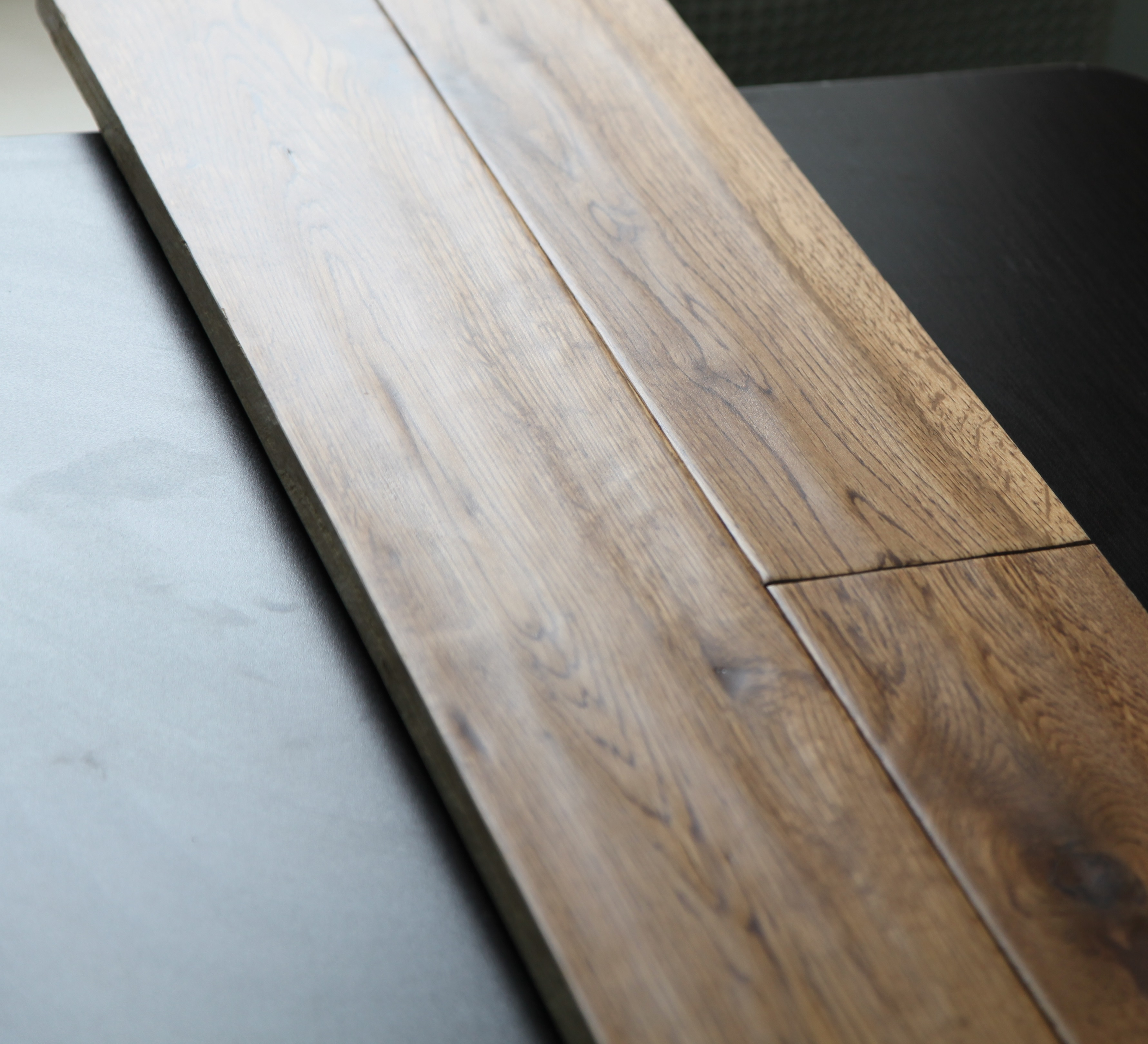 Дуб с эффектом строгания